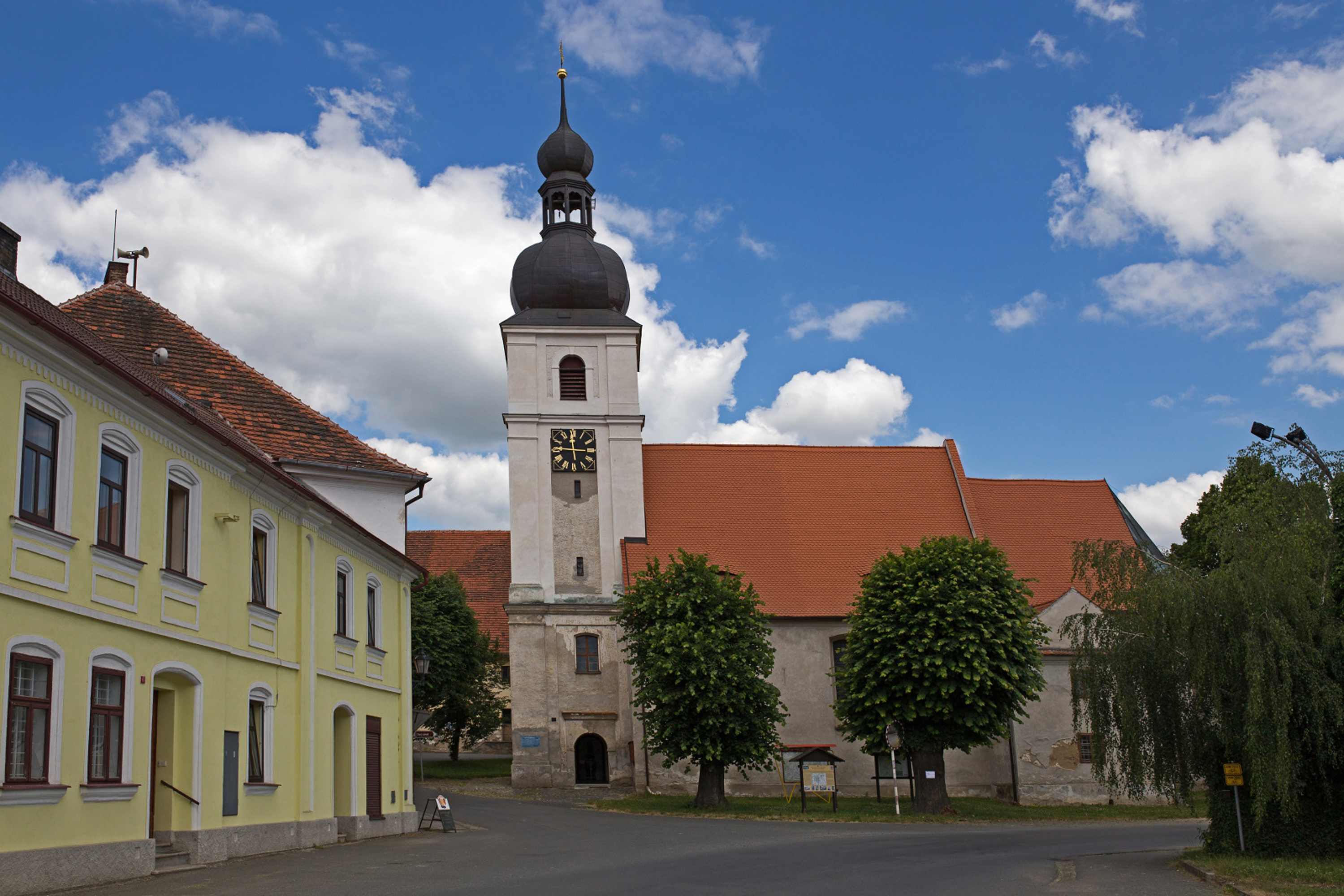 Kostel svatého Jana Křtitele, Mírové náměstí, Chudenice.